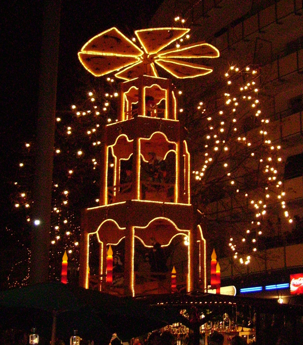 Description: Weihnachtspyramide in Ludwigshafen, Germany Source: own photography Date: November 2005 Author: --Immanuel Giel 08:45, 28 November 2005 (UTC) Other versions: none Weihnachtspyramide